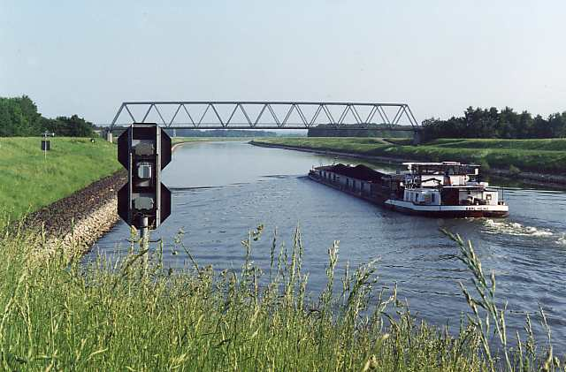 Die nördliche Abzweigung der Elbe in den Elbe-Seitenkanal bei Artlenburg.